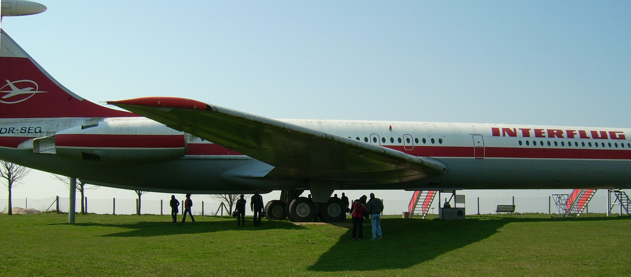 Flugzeug IL-62 „Lady Agnes“ auf dem Flughafen Stölln/Rhinow